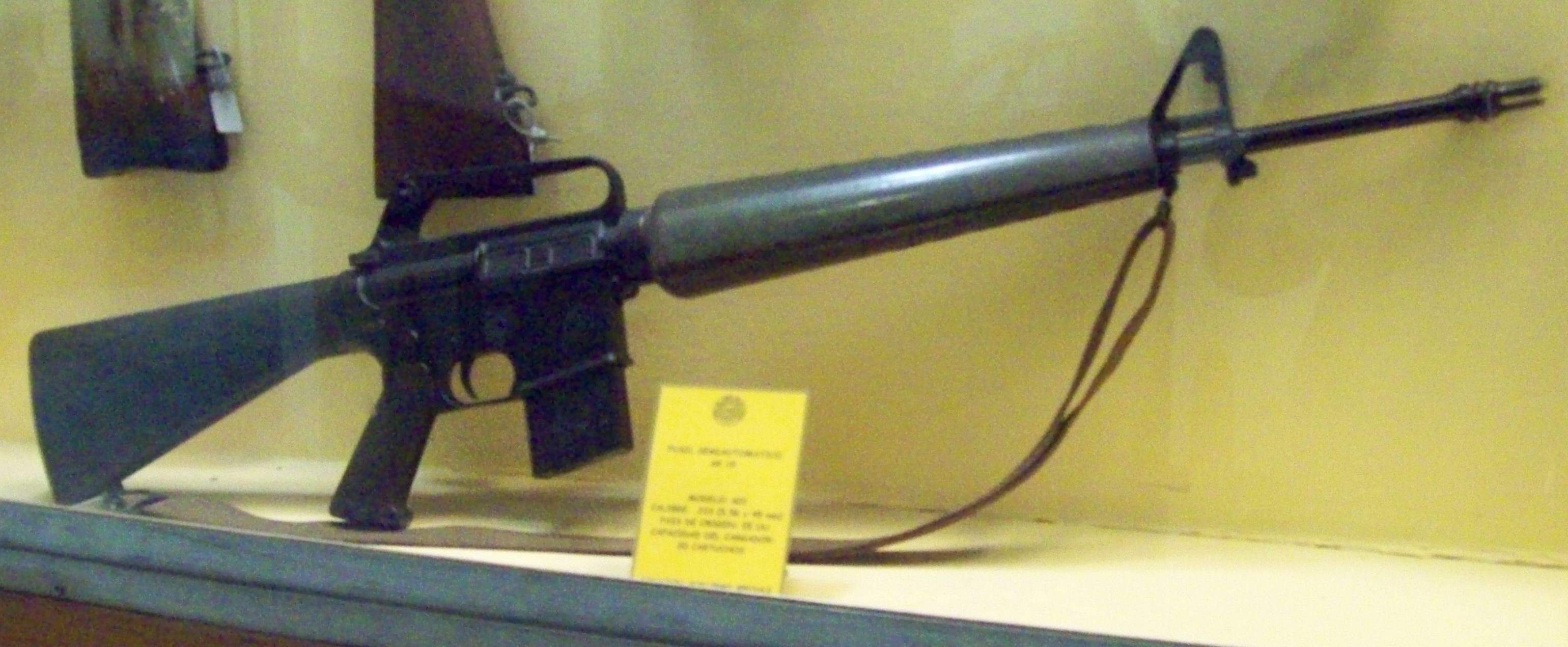 Armamento expuesto en el Museo de Armas de la Nación, ciudad de Buenos Aires, Argentina 2014.